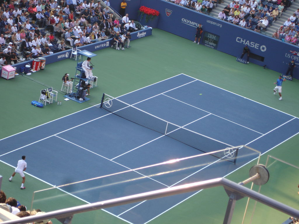 2011 US Open final Novak Đoković vs Rafael Nadal